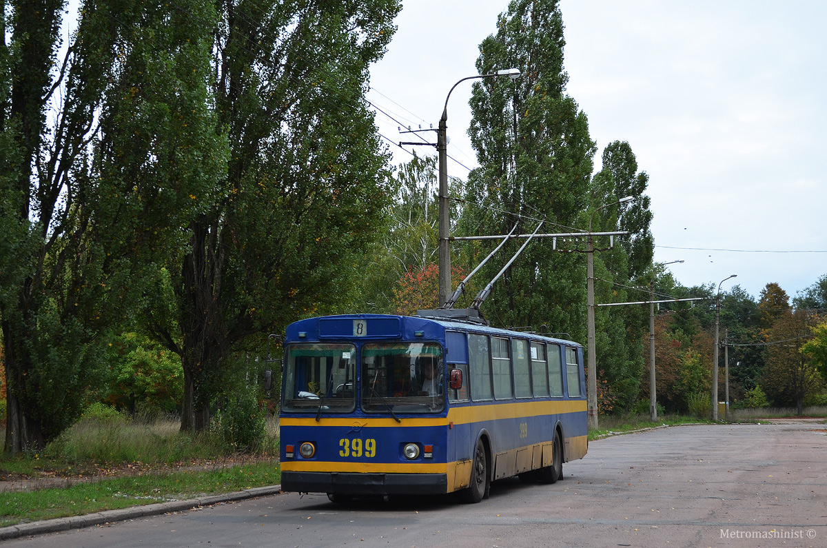 ЗиУ-682В-013 [В0В] №399